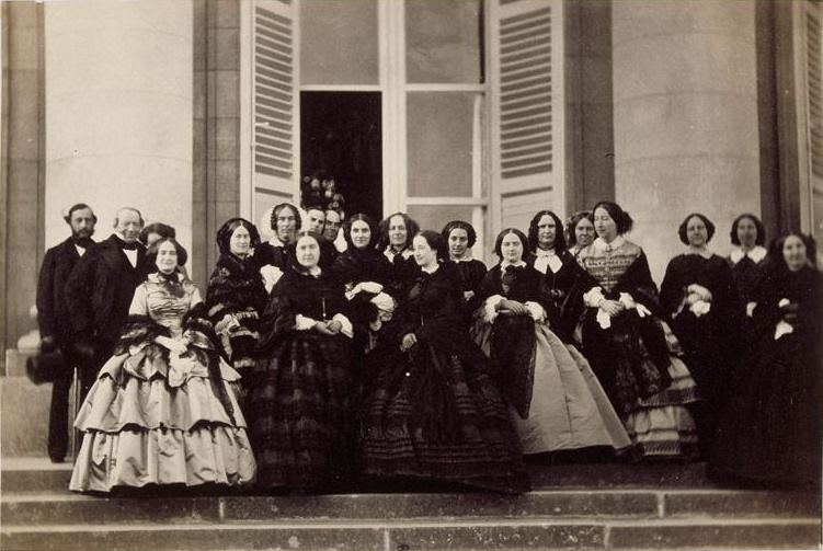 L'Impératrice Eugénie à Compiègne et les dames de la 3ème série de 1856 sur la terrasse du palais